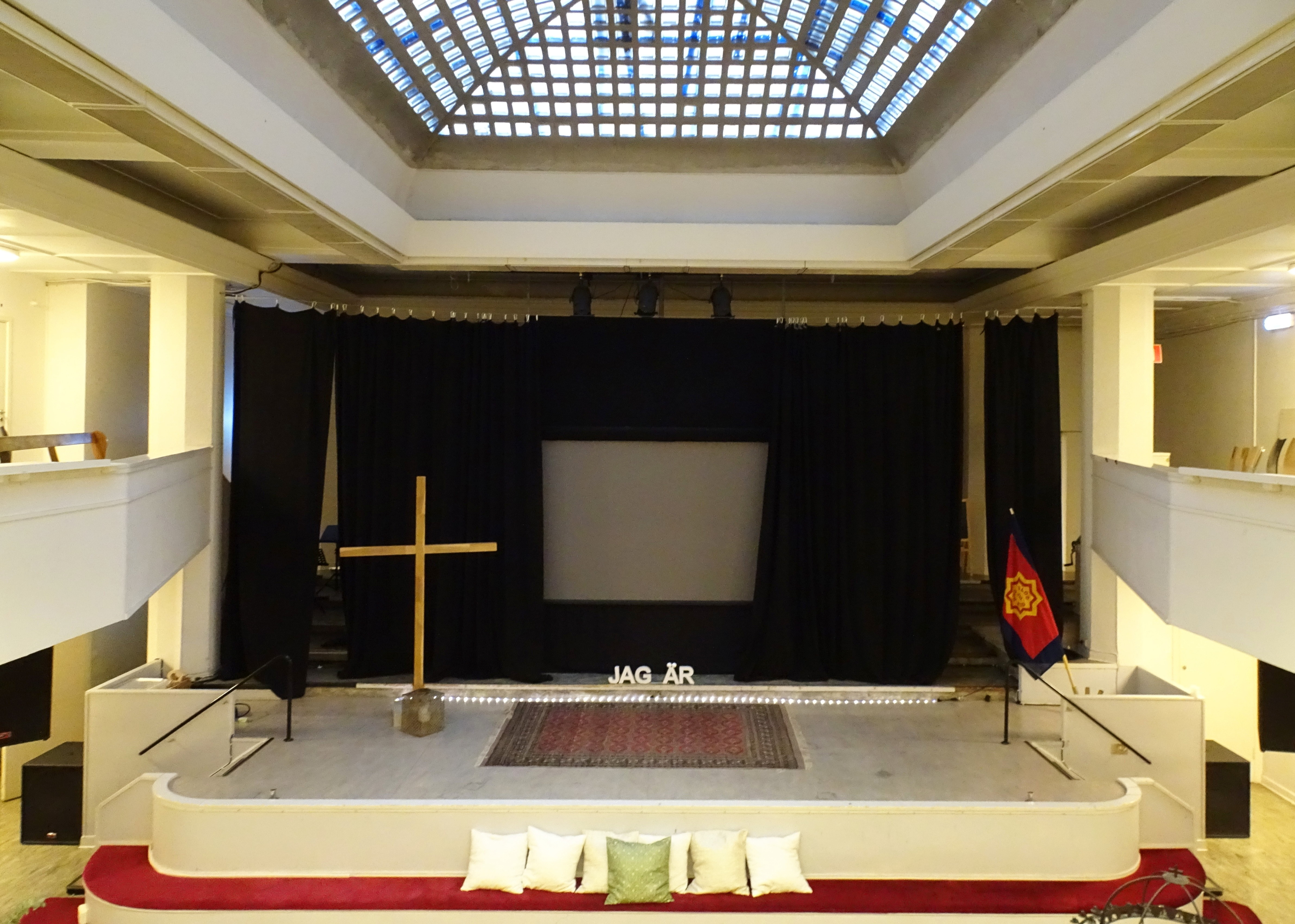 Frälsningsarméns Kår 393, tidigare biograf Ugglan